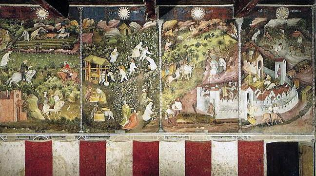 Ciclo dei mesi 00